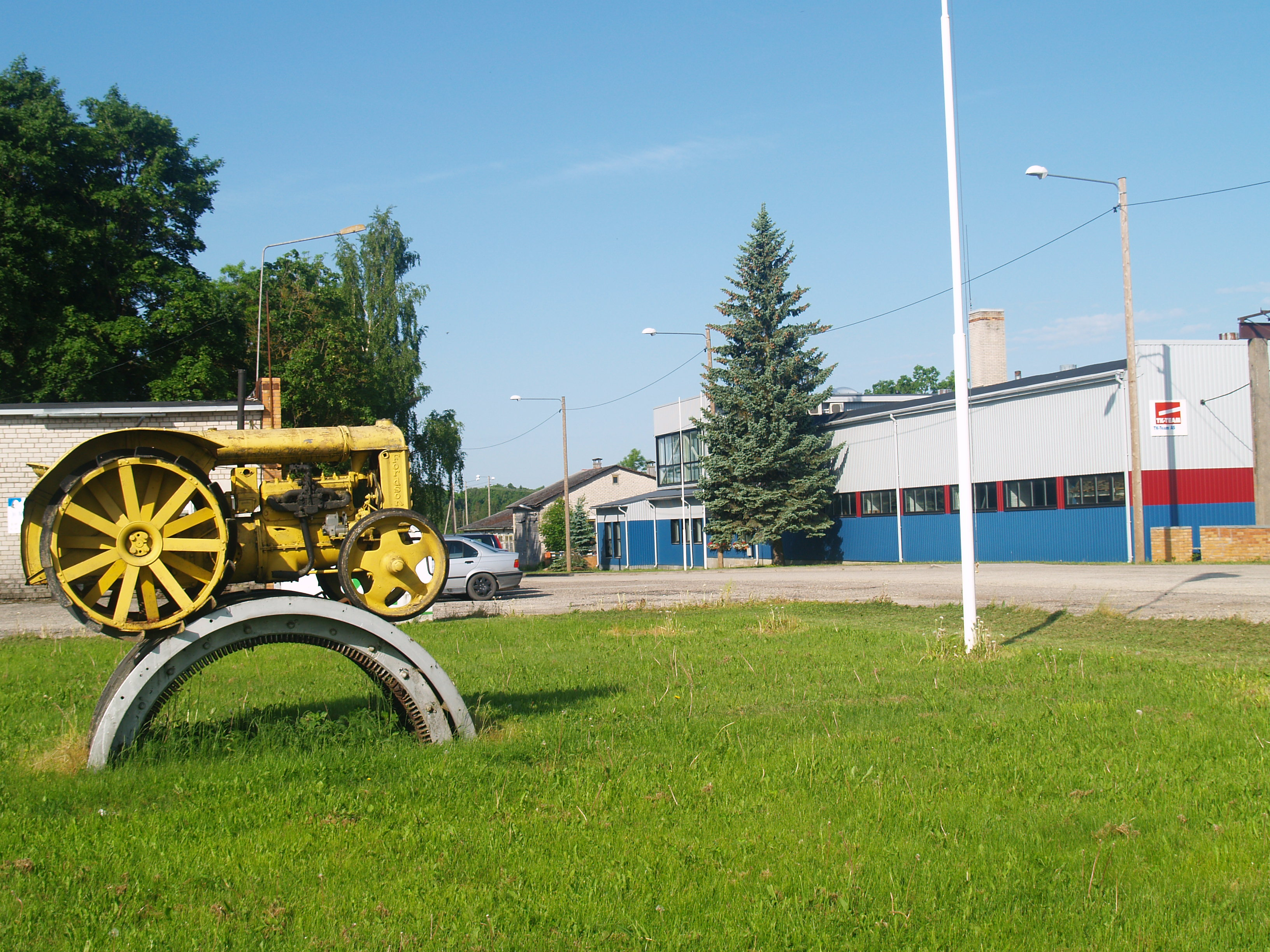 Jõgevamaa fotod